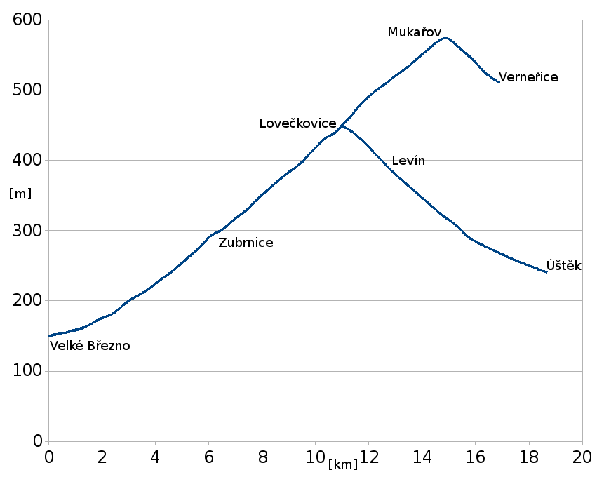 Profil zrušené trati Velké Březno - Zubrnice - Verneřice - Úštěk